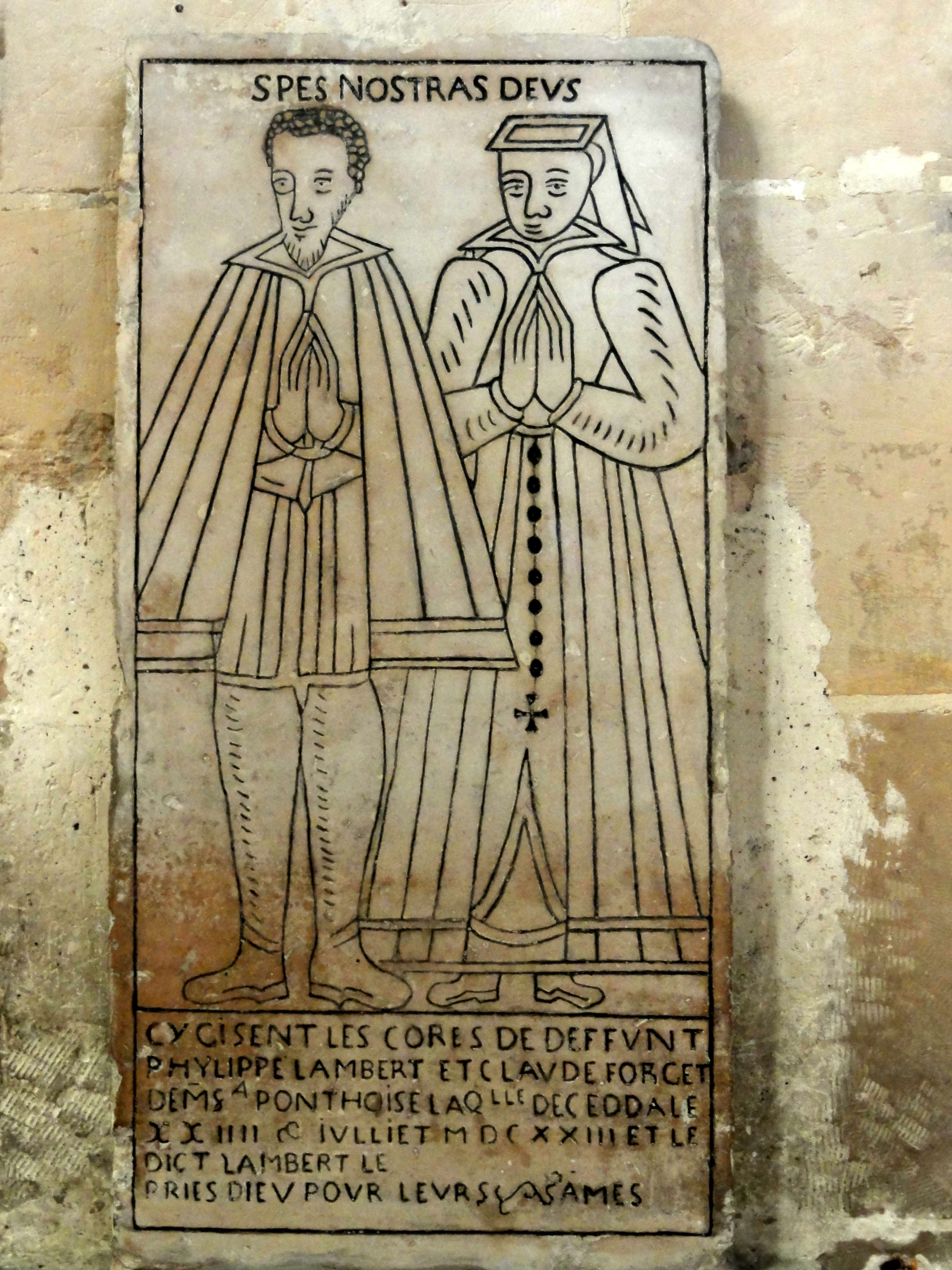 Dalle funéraire de Philippe Lambert et de Claude Forget, sa femme, morte en 1623.